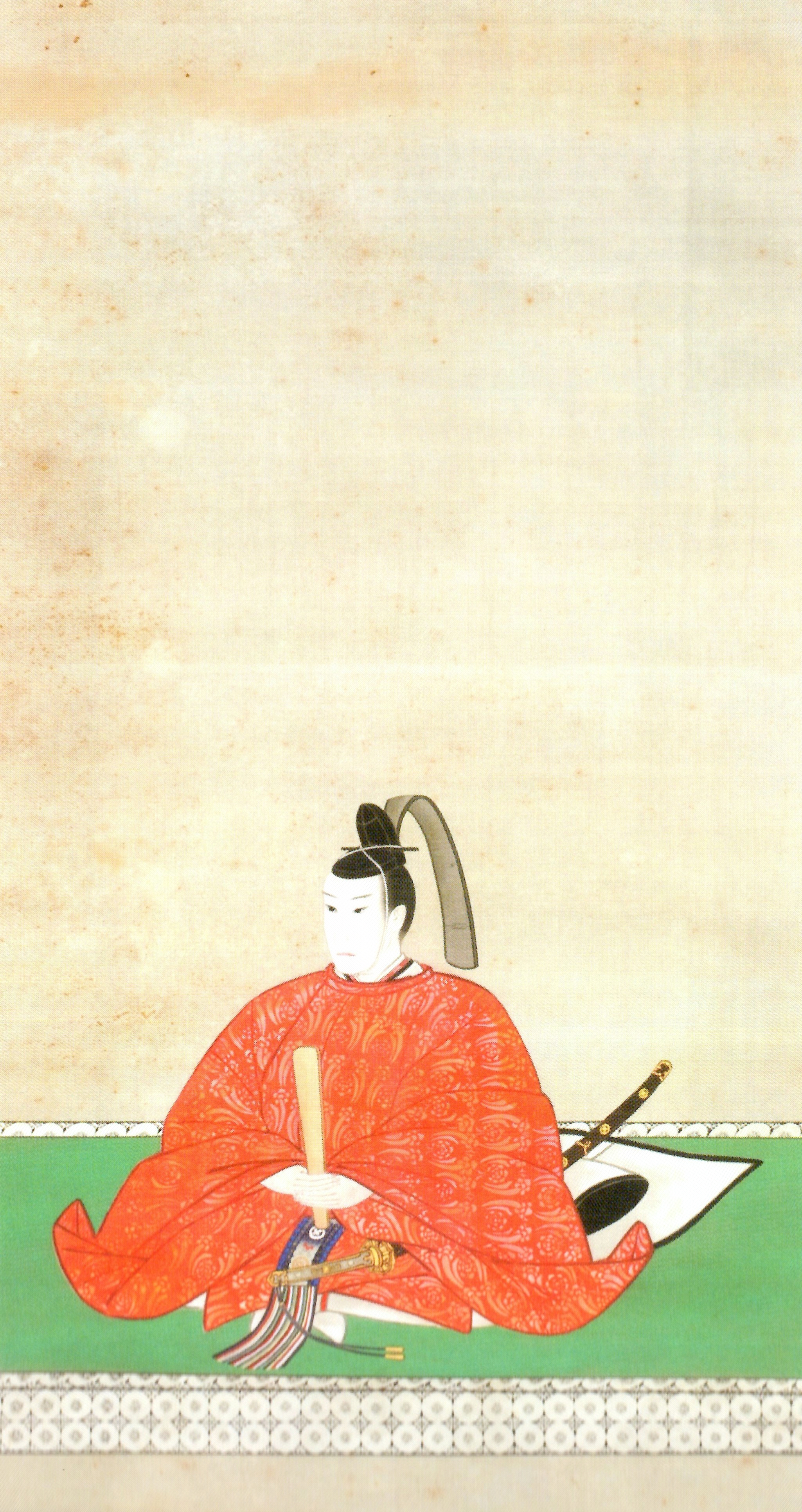 阿部正方の肖像。